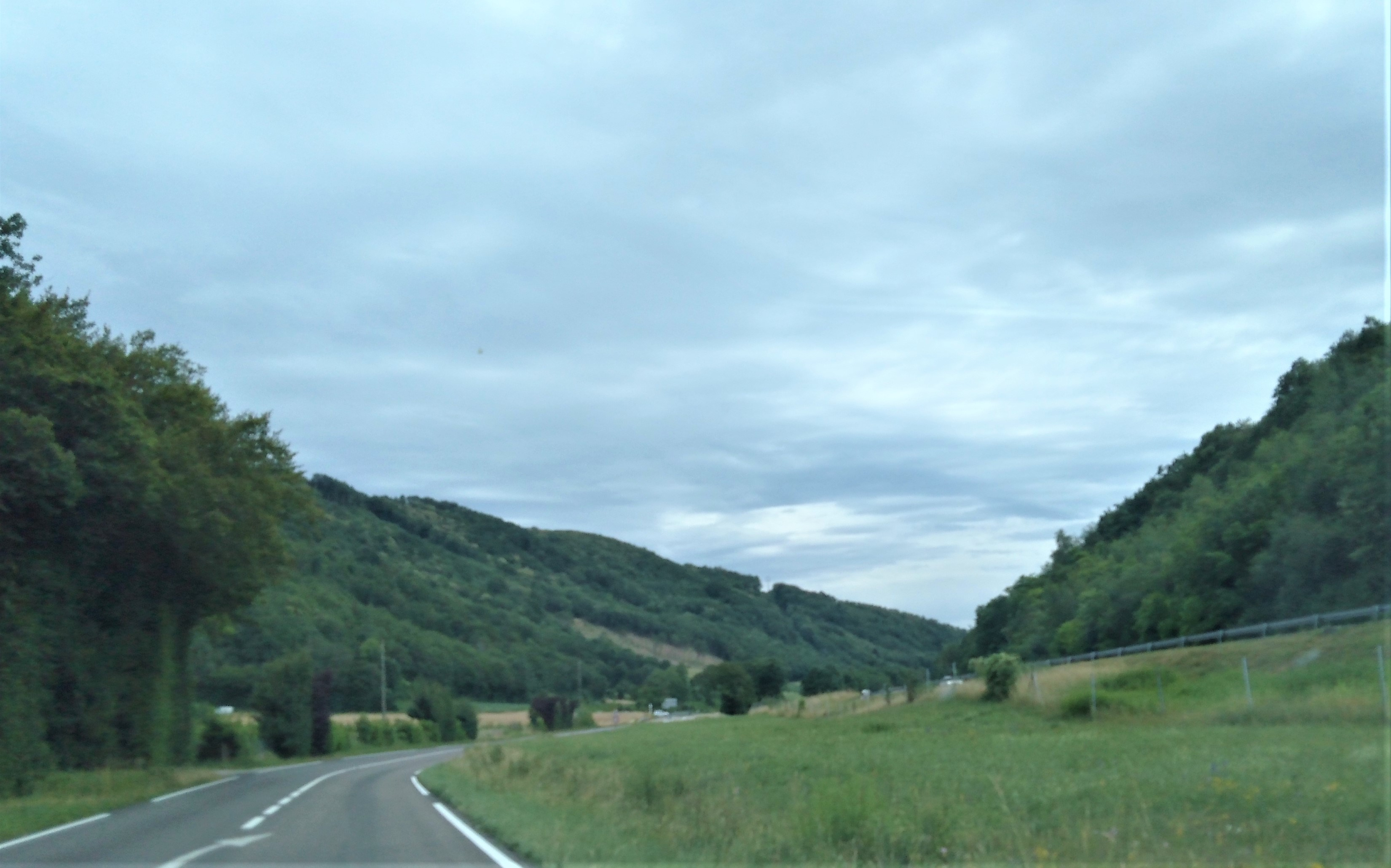 Trouée de Colombe depuis Oyeu en Juillet 2019